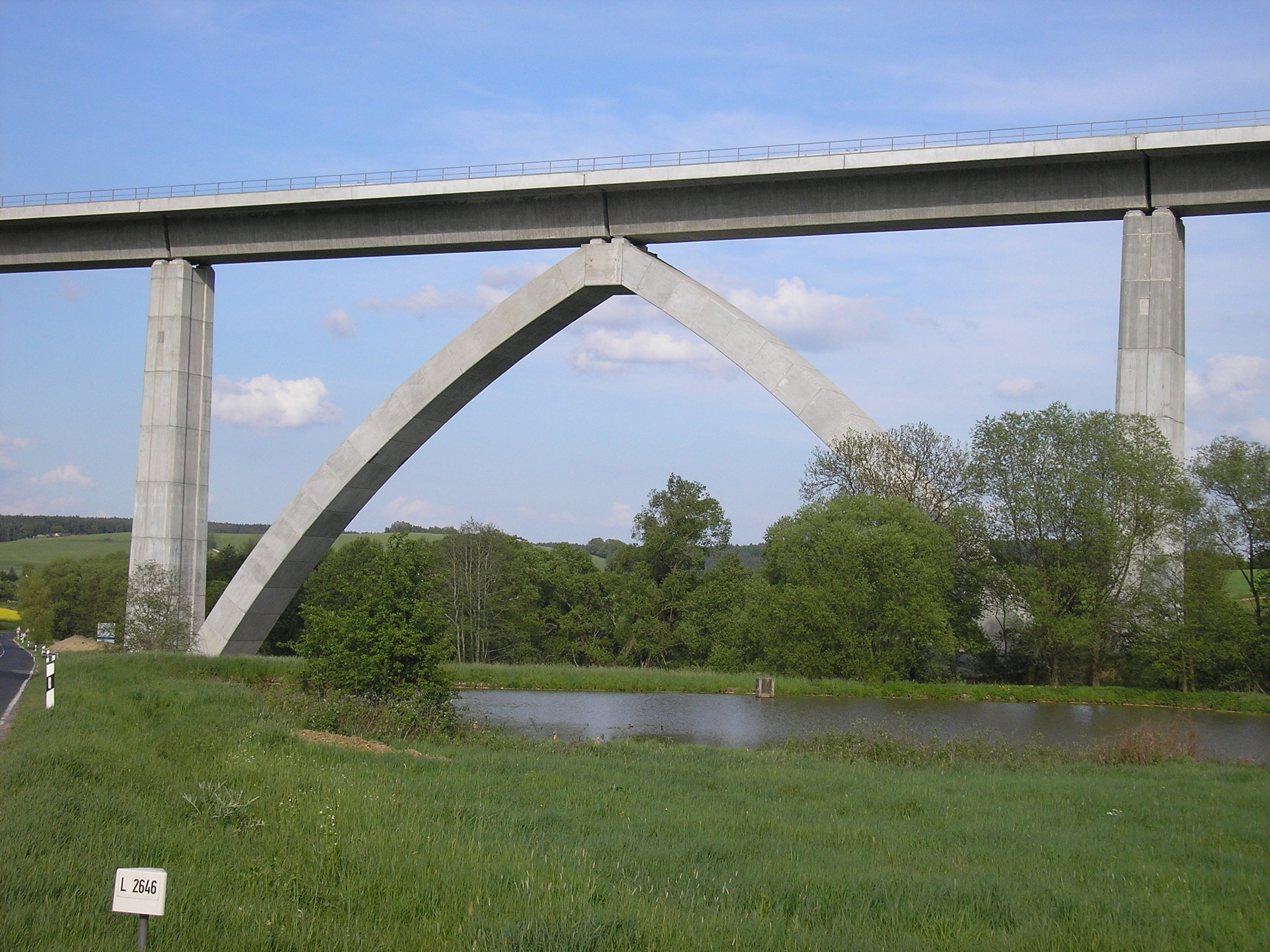 Mittelteil der Wümbachtalbrücke bei Wümbach (Thüringen) der Hochgeschwindigkeits-Neubaustrecke Erfurt-Ebensfeld.